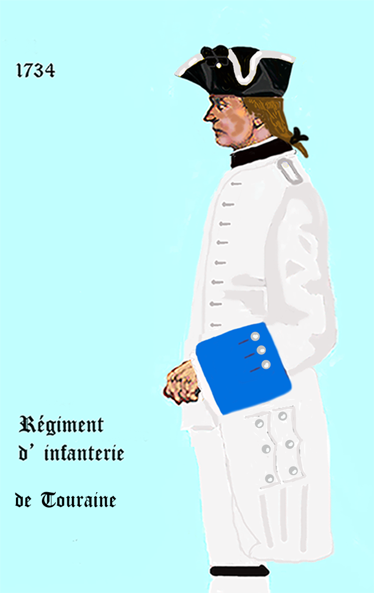 Uniform eines königlich französischen Infanterie-Regiments gemäß Dekret von 1734. - Entnommen und überarbeitet aus: „LES UNIFORMES ET LES DRAPEAUX DE L'ARMÉE DU ROI“ Marseille 1899.